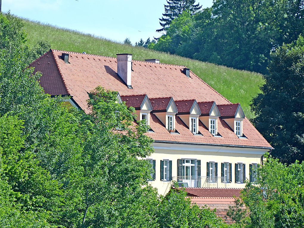 Sankt Andrä-Höch Schloss Harrachegg ObjektID: 36508